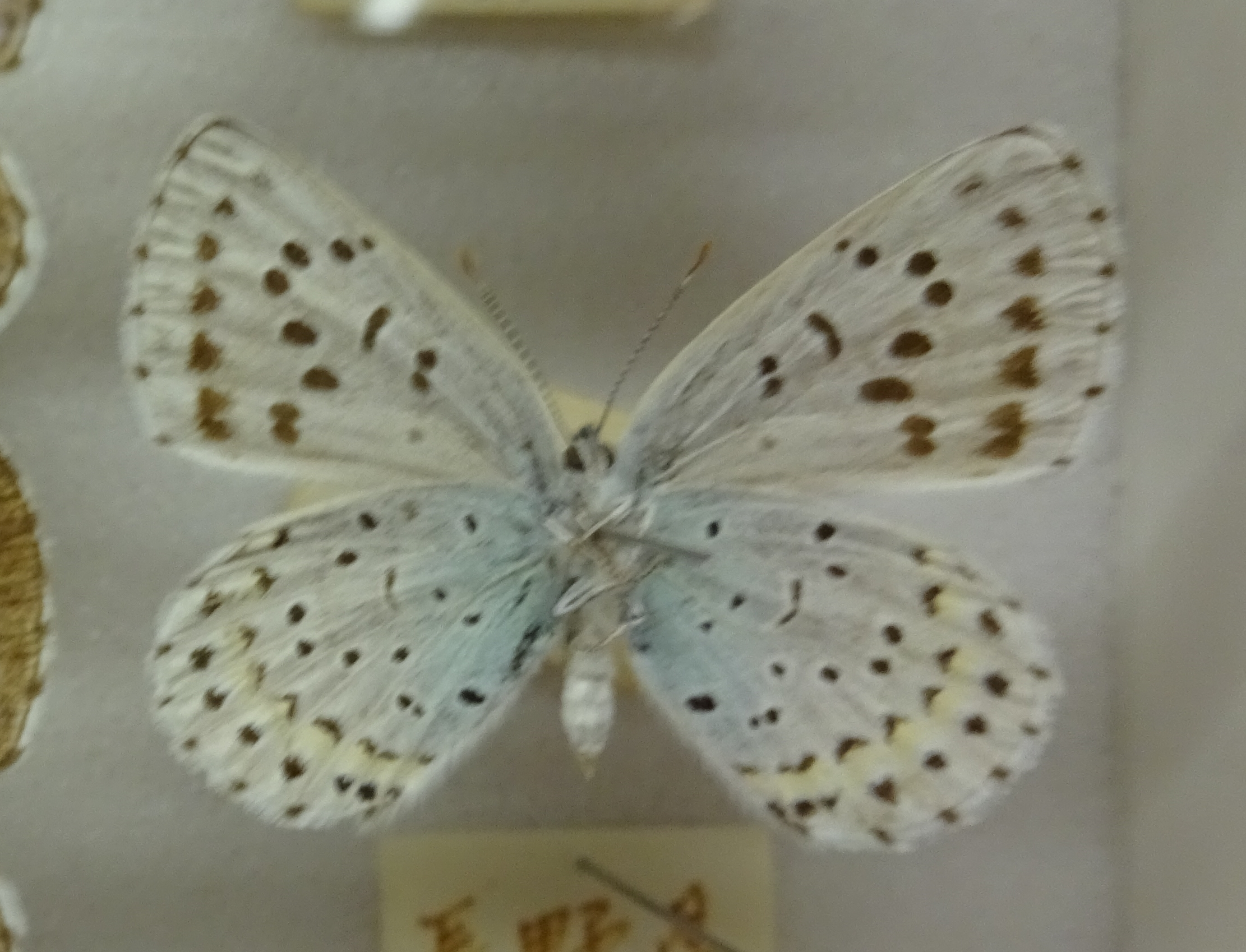 オオルリシジミ